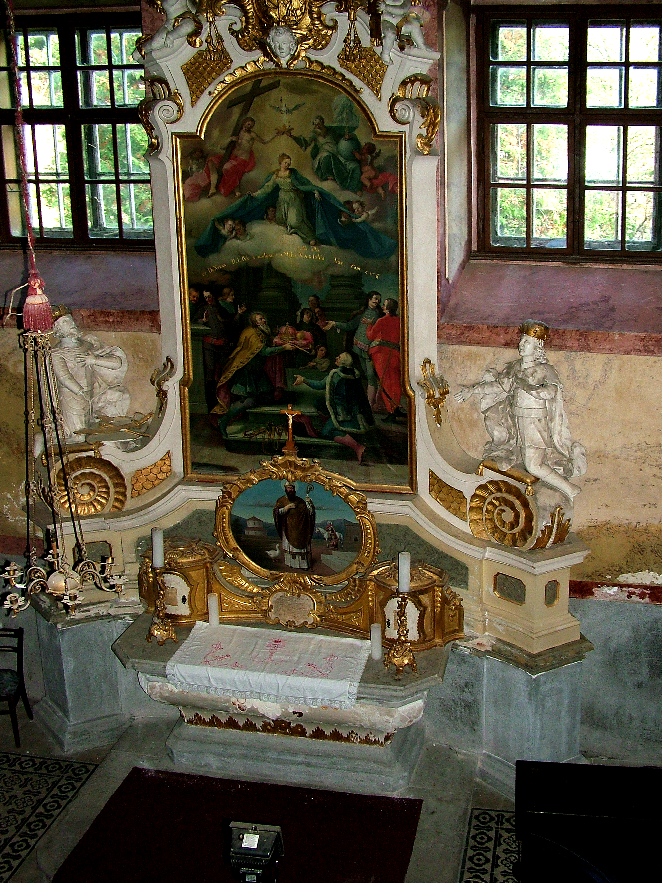 Sümegi püspöki palota